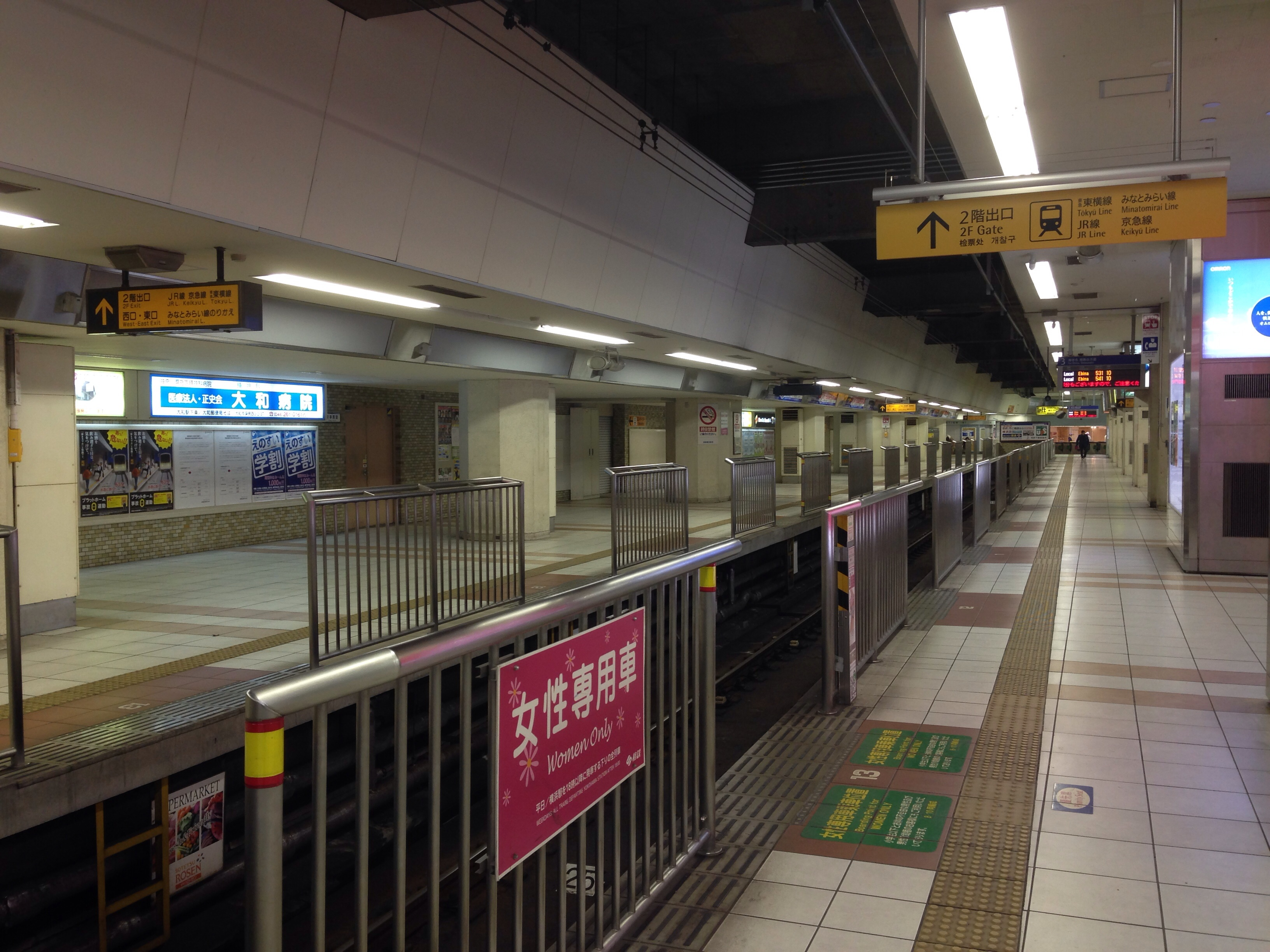 相鉄線横浜駅の案内サイン。蛍光灯による旧型（左）とLEDを使用した新案内サイン（右）。※画像ではどちらも消灯中